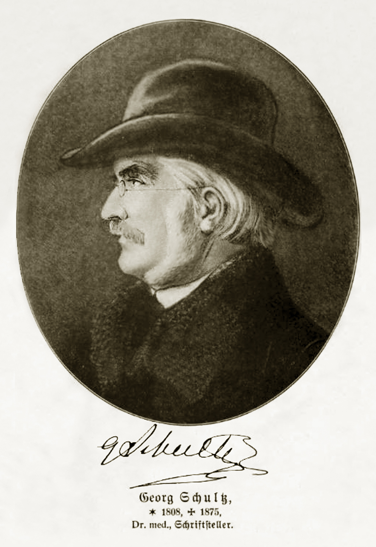 Доктор медицины, писатель Егор Христианович Шульц